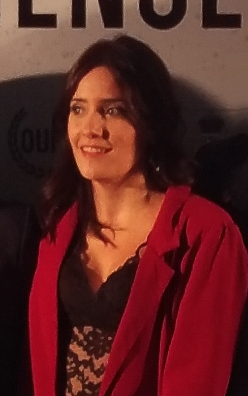 Ver título.